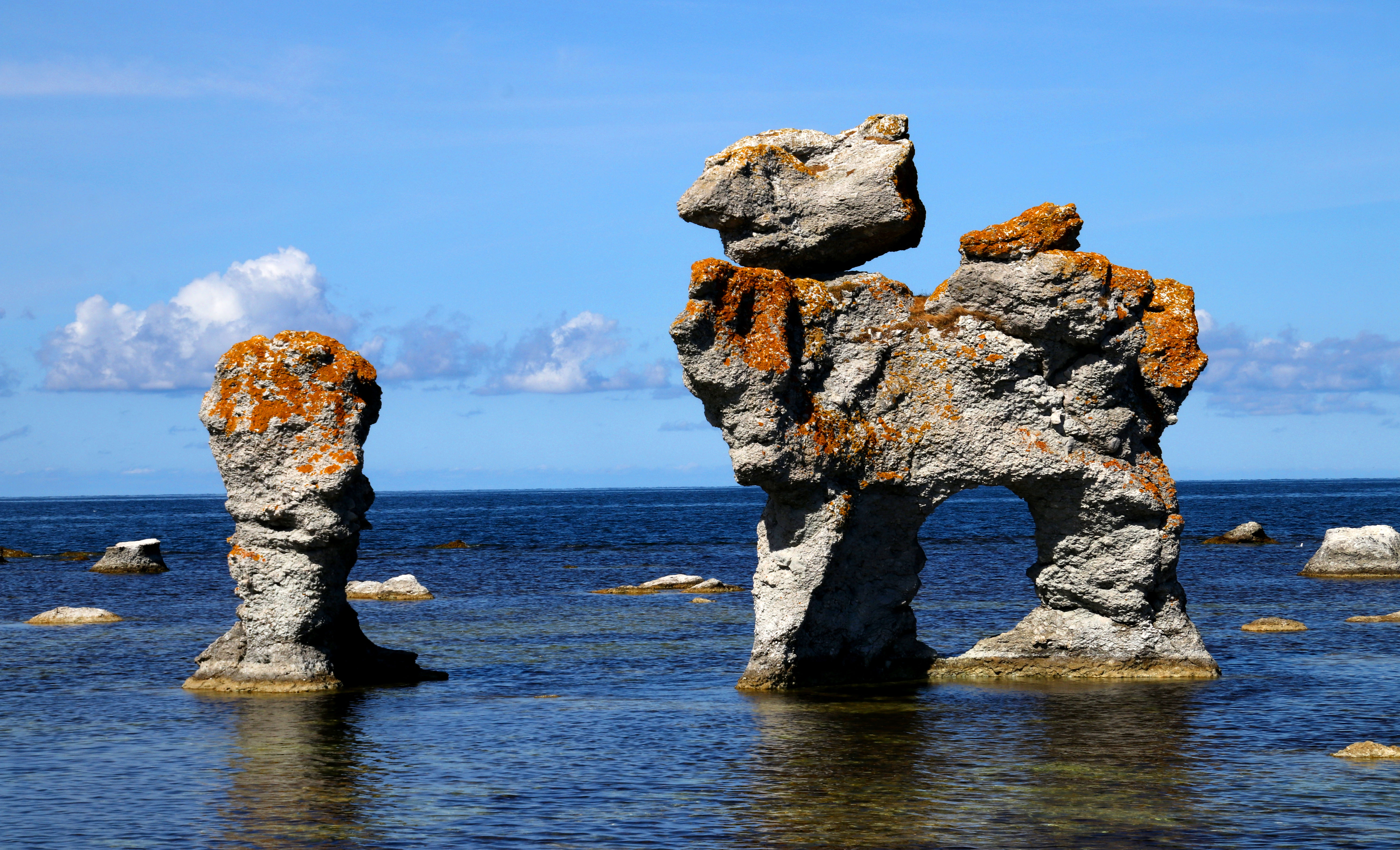 Fårö. Raukarna på Gamla Hamn.